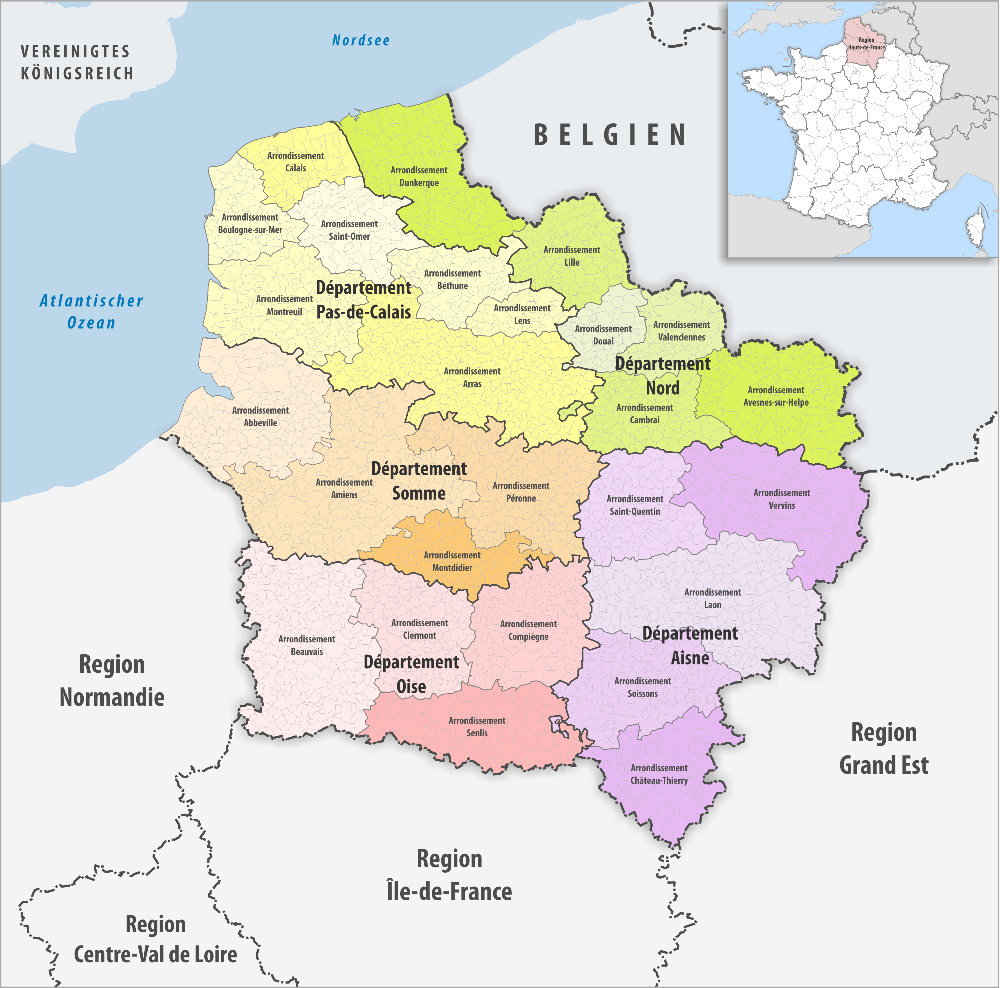 Gemeinden, Arrondissemente und Departemente in der Region Hauts-de-France